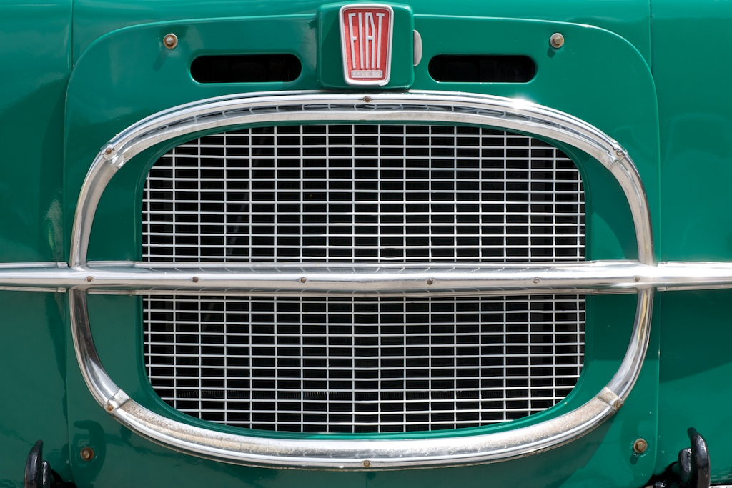 OldtimerLastwagen28